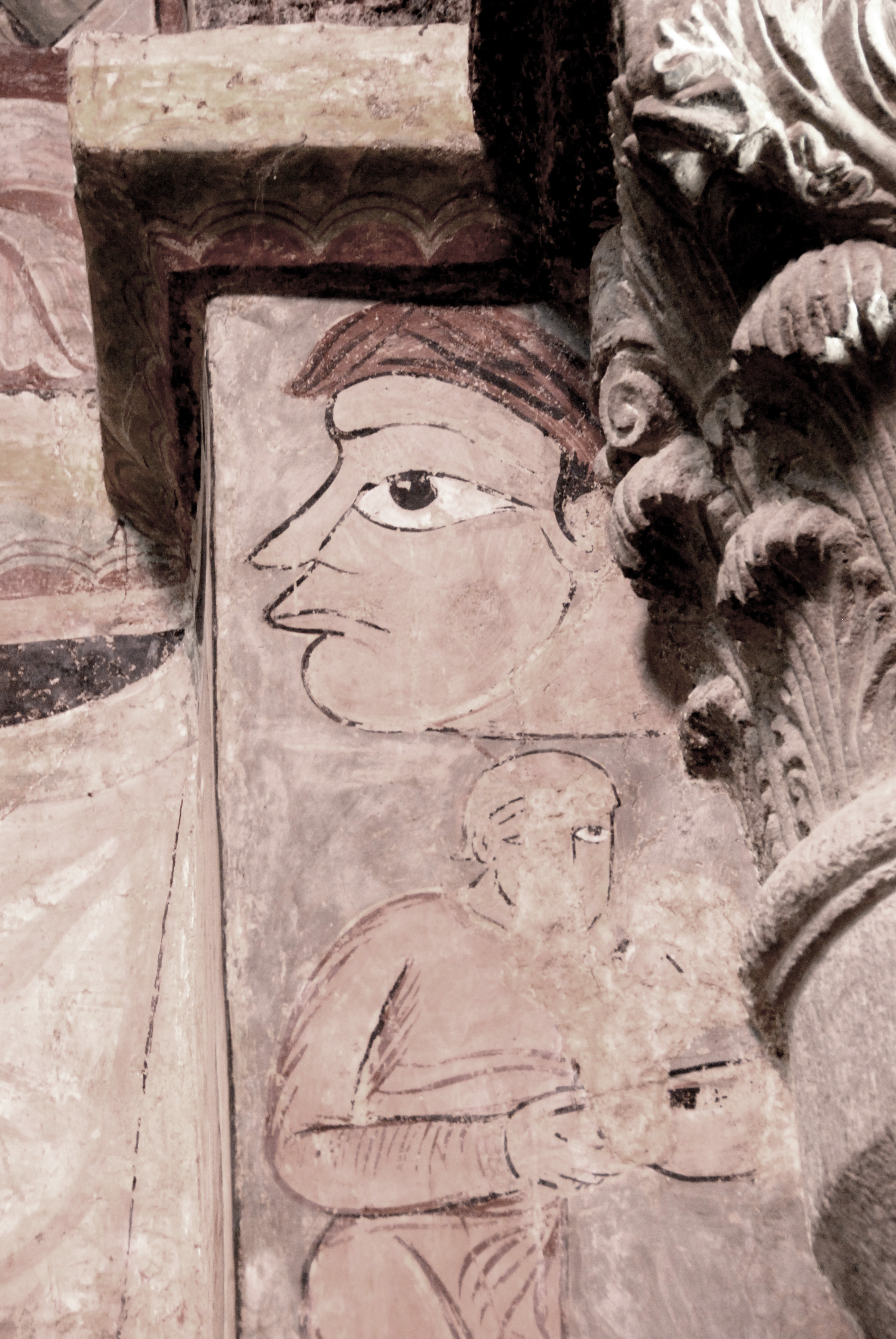 Sain-Julien Brioude, Fresko auf Narthexpfeiler